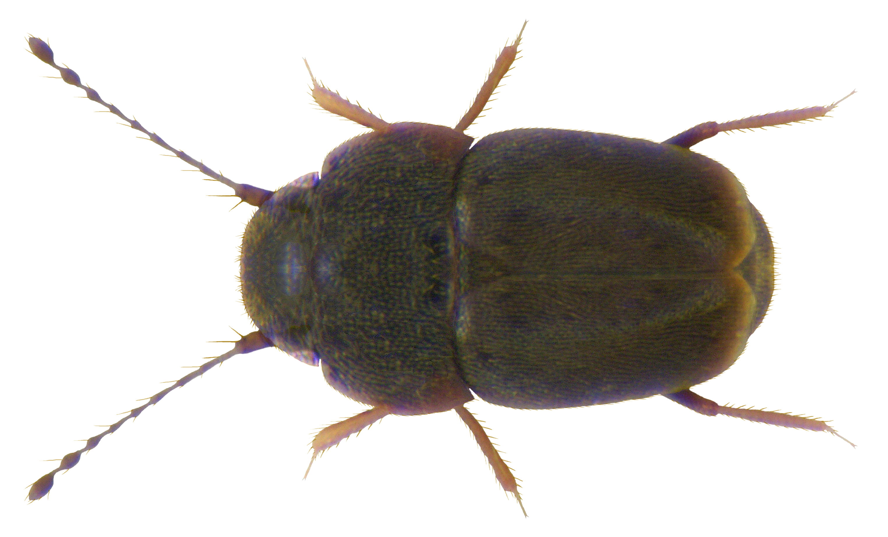 Familie: Ptiliidae Groesse: 0,75-0,85 mm Verbreitung: Europa Ökologie: an Meeresküsten unter Tang Fundort: Mallorca, Deia leg.det. M.Darby, 1988 Photo: U.Schmidt, 2009